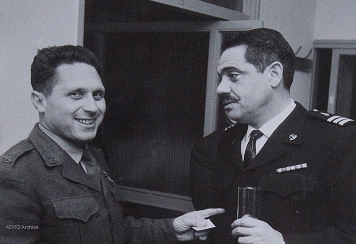 ראובן אשכנזי ביחסי עבודה טובים עם ראש אמ"ן אהרון יריב